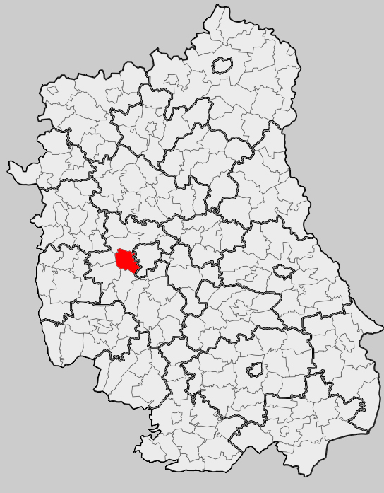 Map of gmina Konopnica, Lublin county, Lublin voivodship Mapa gminy Konopnica, powiat lubelski, województwo lubelskie